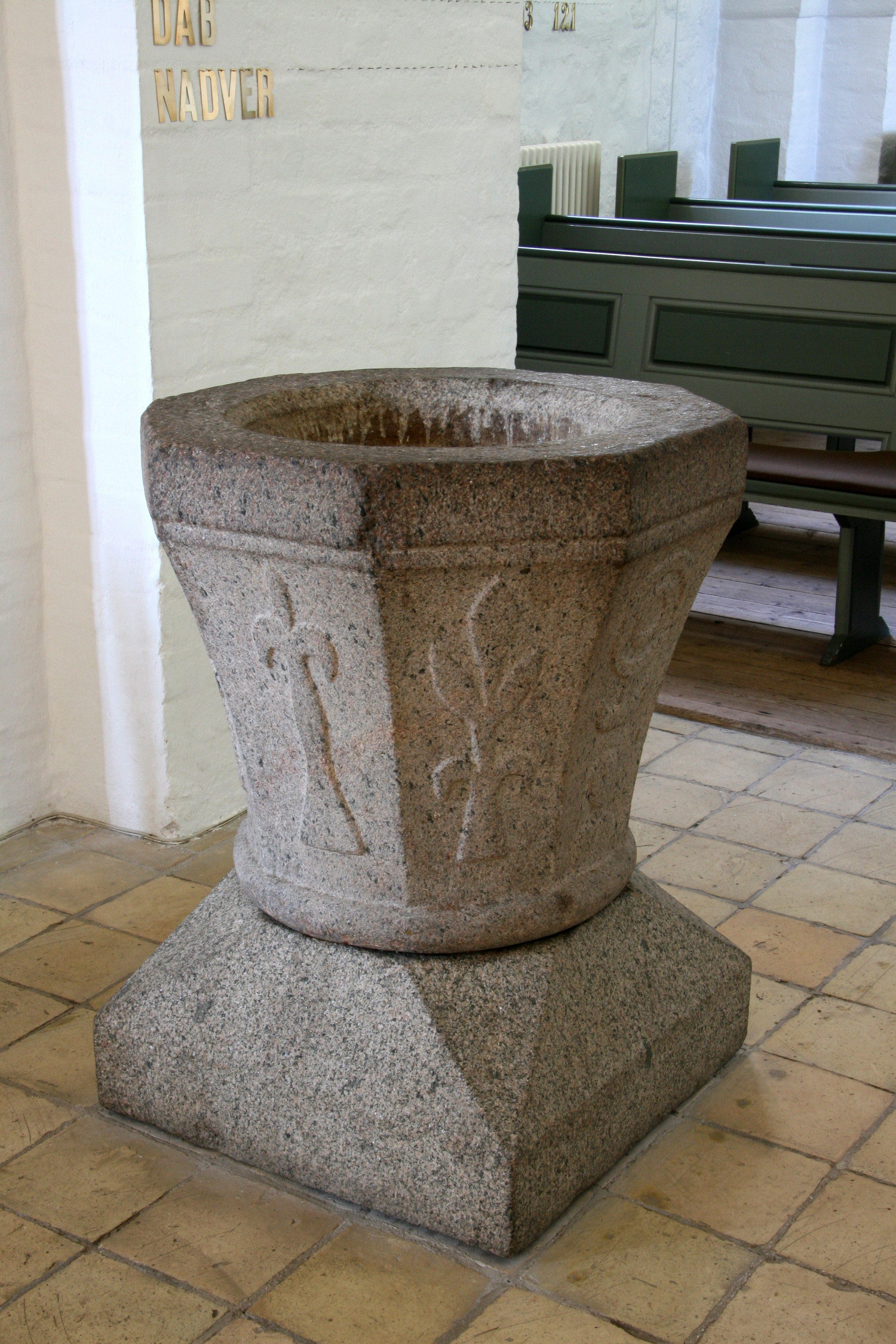 Sankt Peders Kirke in Slagelse, Denmark. Baptismal font